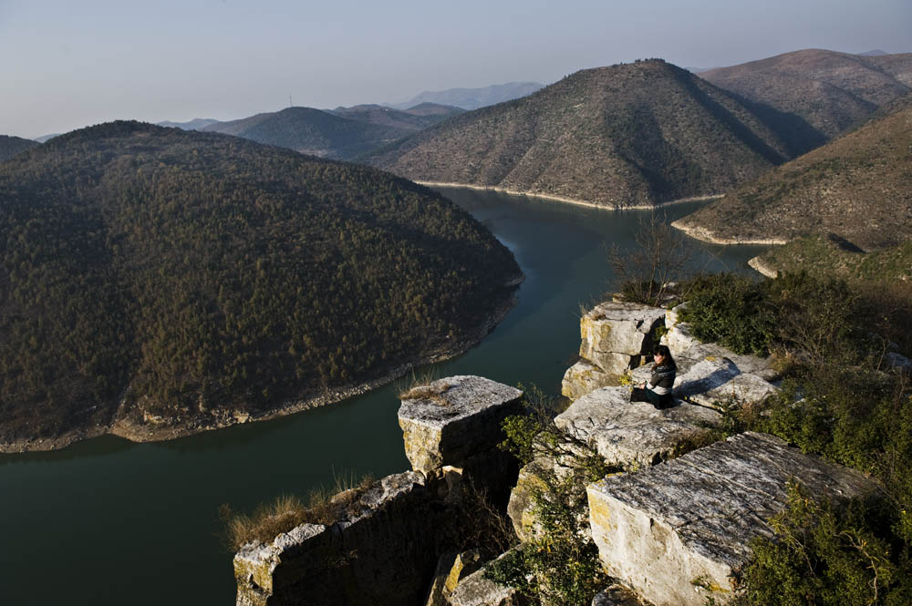 djdgy